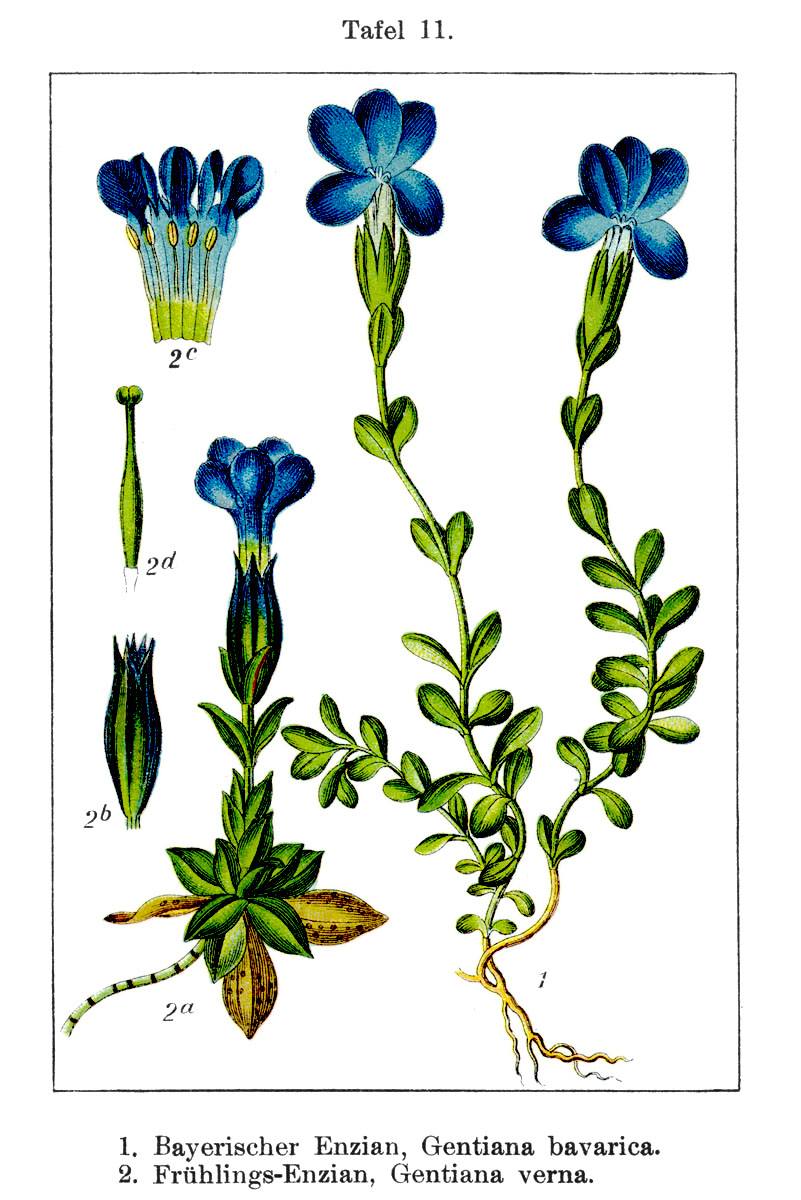 1. Gentiana bavarica L., 2. Gentiana verna L. Original Caption 1. Bayerischer Enzian, Gentiana bavarica 2. Frühlings-Enzian, Gentiana verna